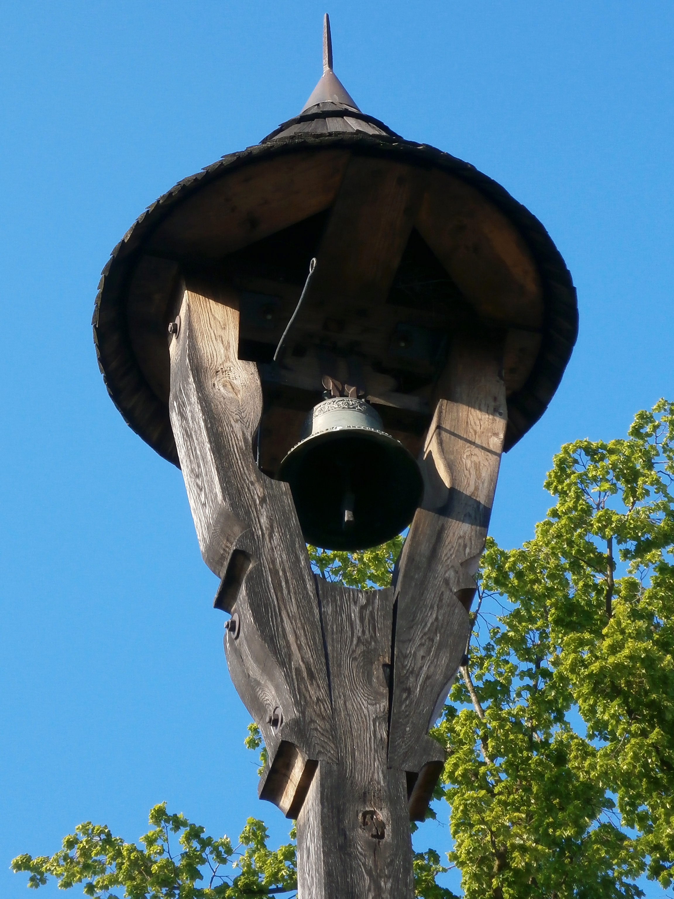 Zvonička ve Farářství (Hradec Králové)